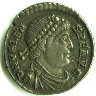 Monnaie d'argent de Valens.